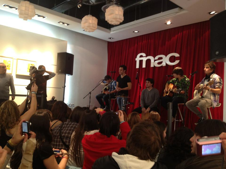 Concert d'Amelie a Maquinista